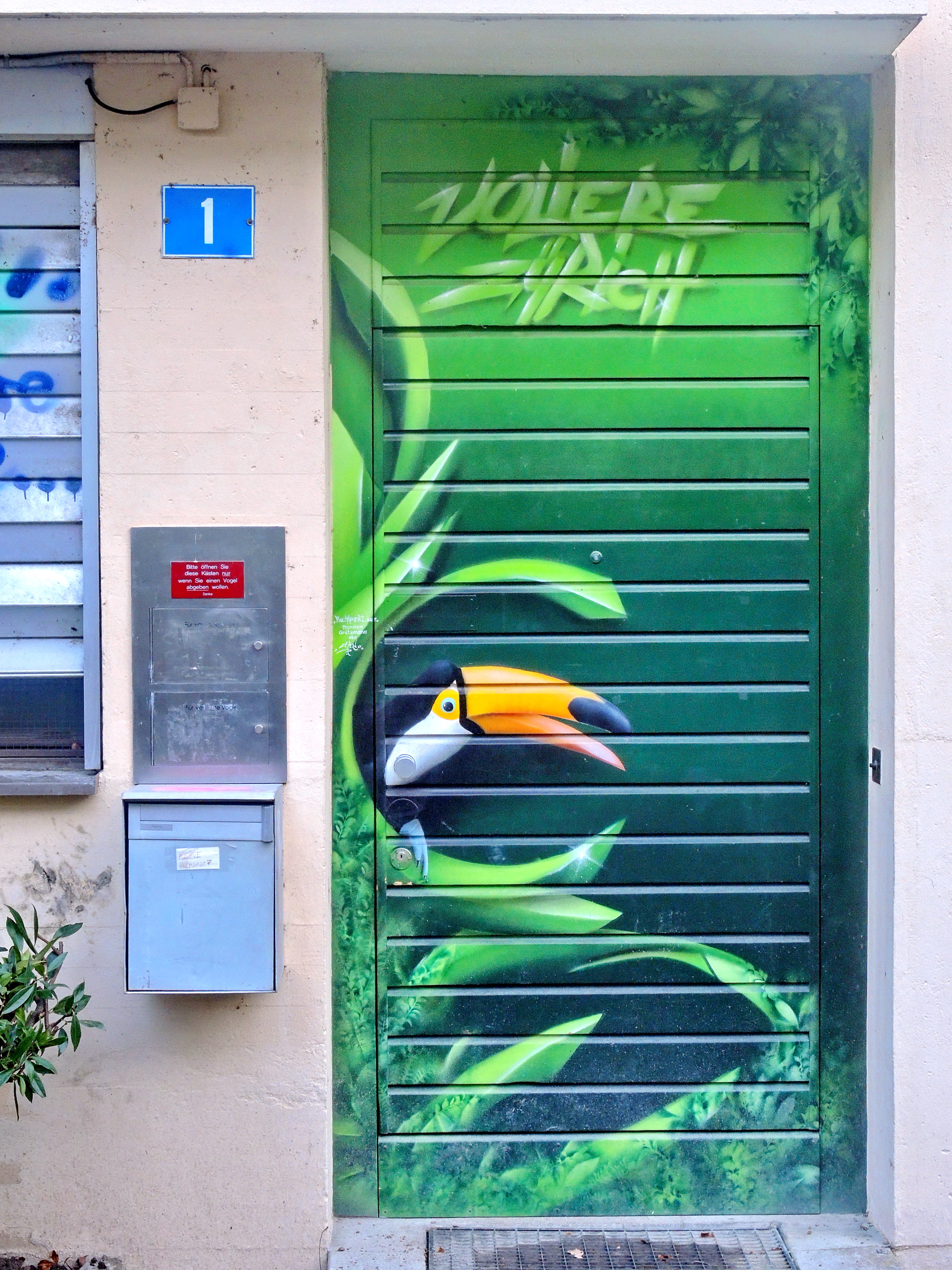 Voliere, Arboretum in Zürich-Enge (Switzerland)